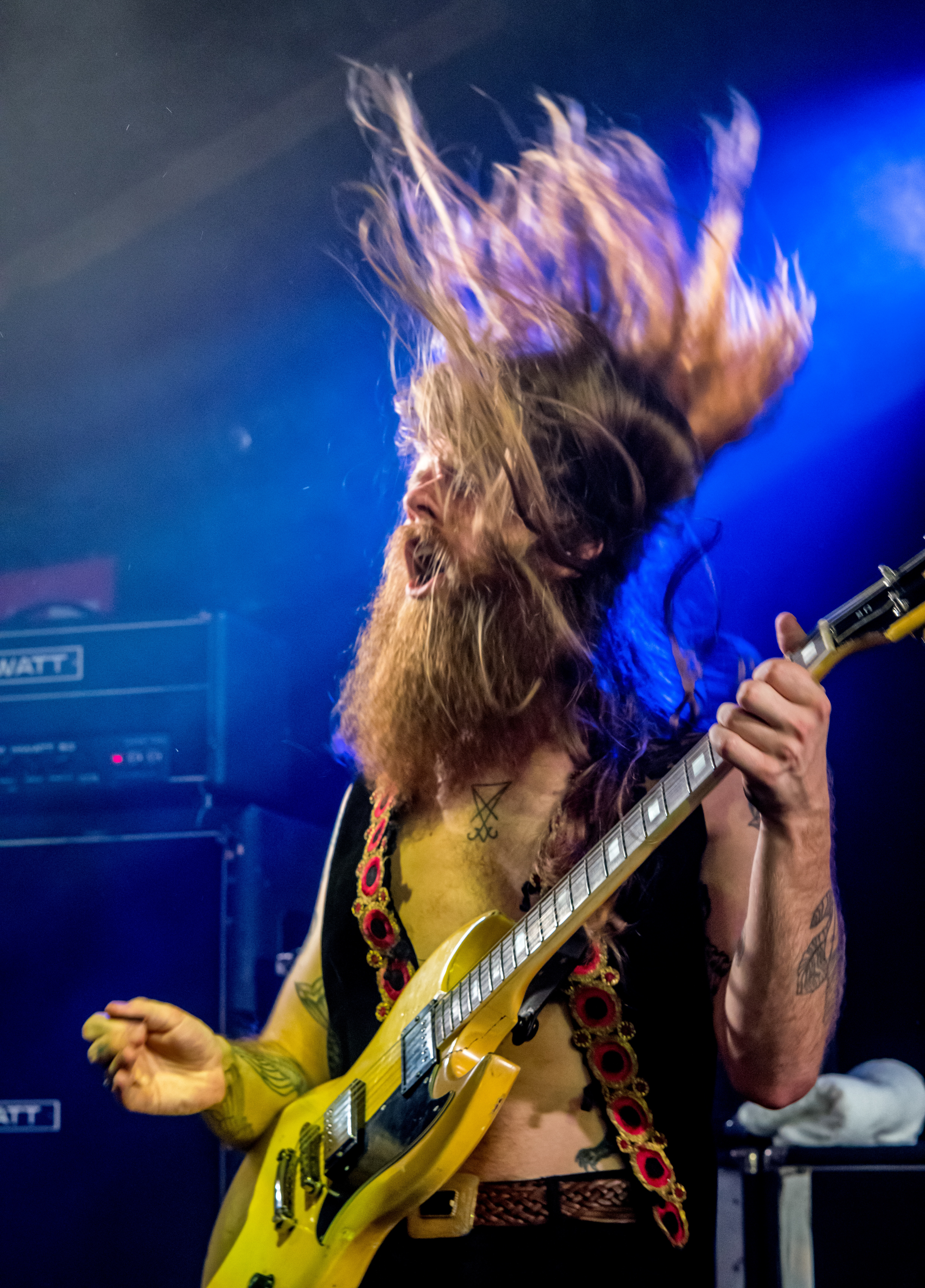 Bilder vom Zelt Musik Festival 2017 in Freiburg im Breisgau